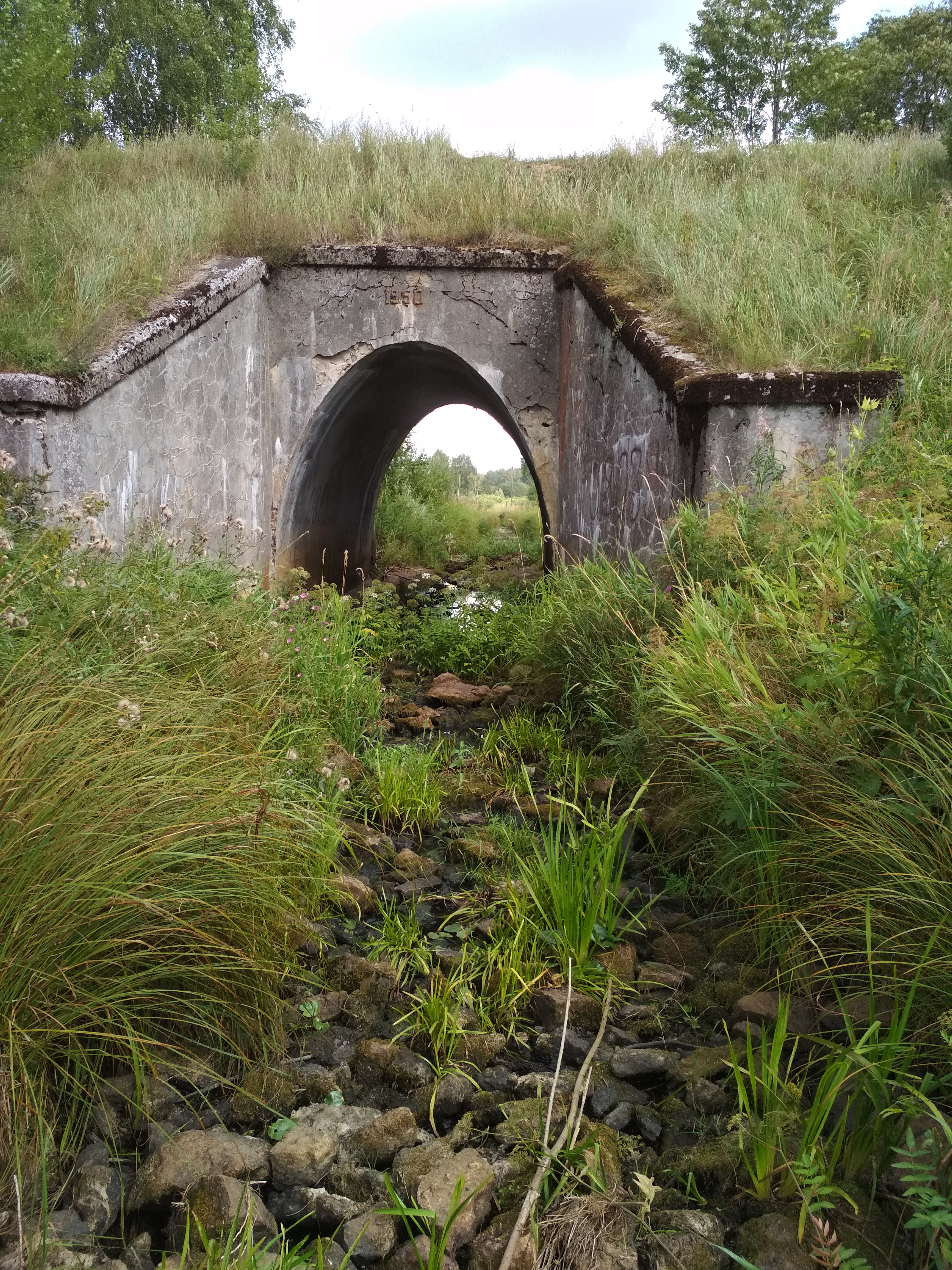 Raudteesild kunagisel Valga–Koikküla raudteeliinil